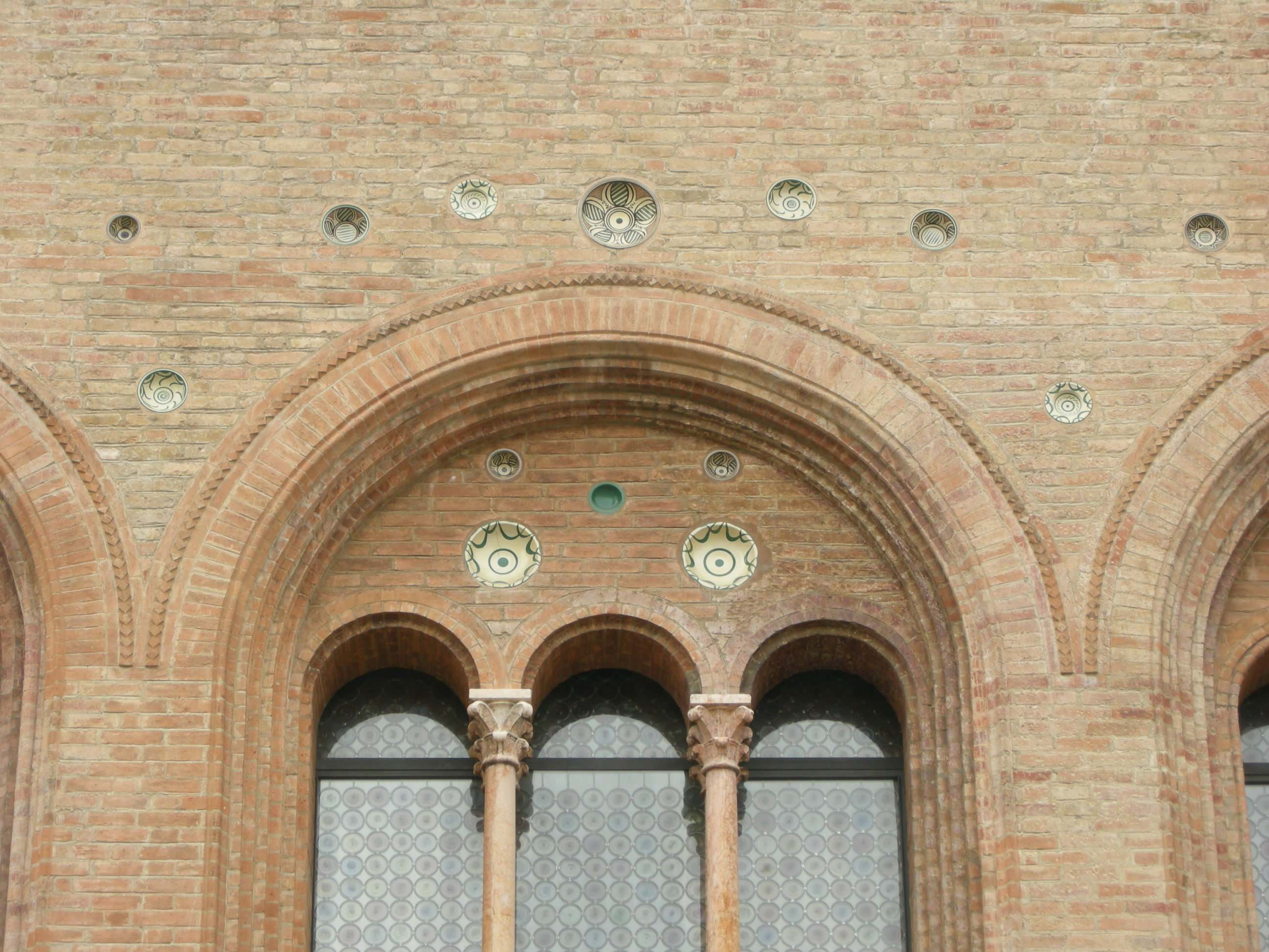 Parma, palazzo arcivescovile, bifora